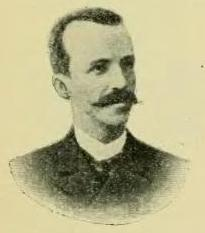 Ruy Barbosa